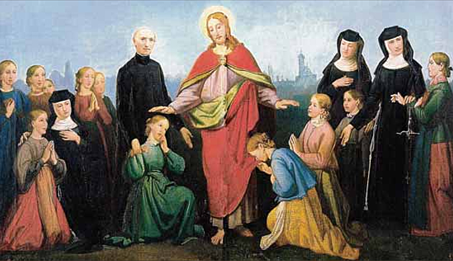 Dieses schöne Gemälde von Anton Bernreiter (1836-1892) wurde erst vor kurzem entdeckt und nun als Reproduktion in den Kirchenführer aufgenommen. Es zeigt den segnenden Christus mit Regens Wagner, drei Dillinger Franziskanerinnen und Kindern. Im Hintergrund ist die Silhouette der Stadt Dillingen erkennbar.